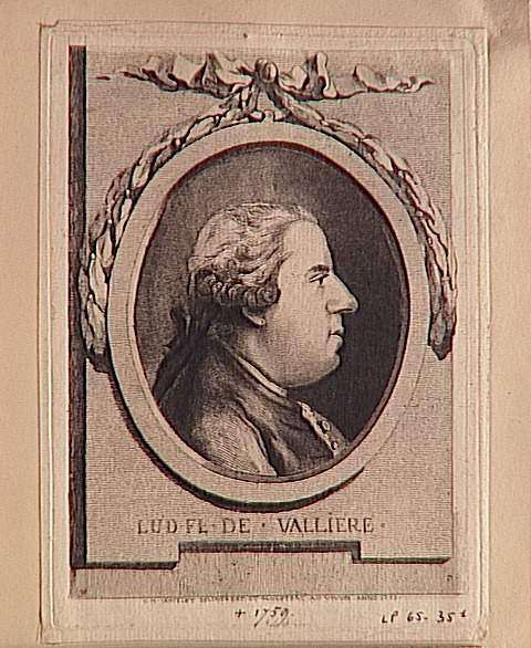 Louis-Florent de Vallière (1719-1775), gouverneur général de Saint-Domingue 1772–1775